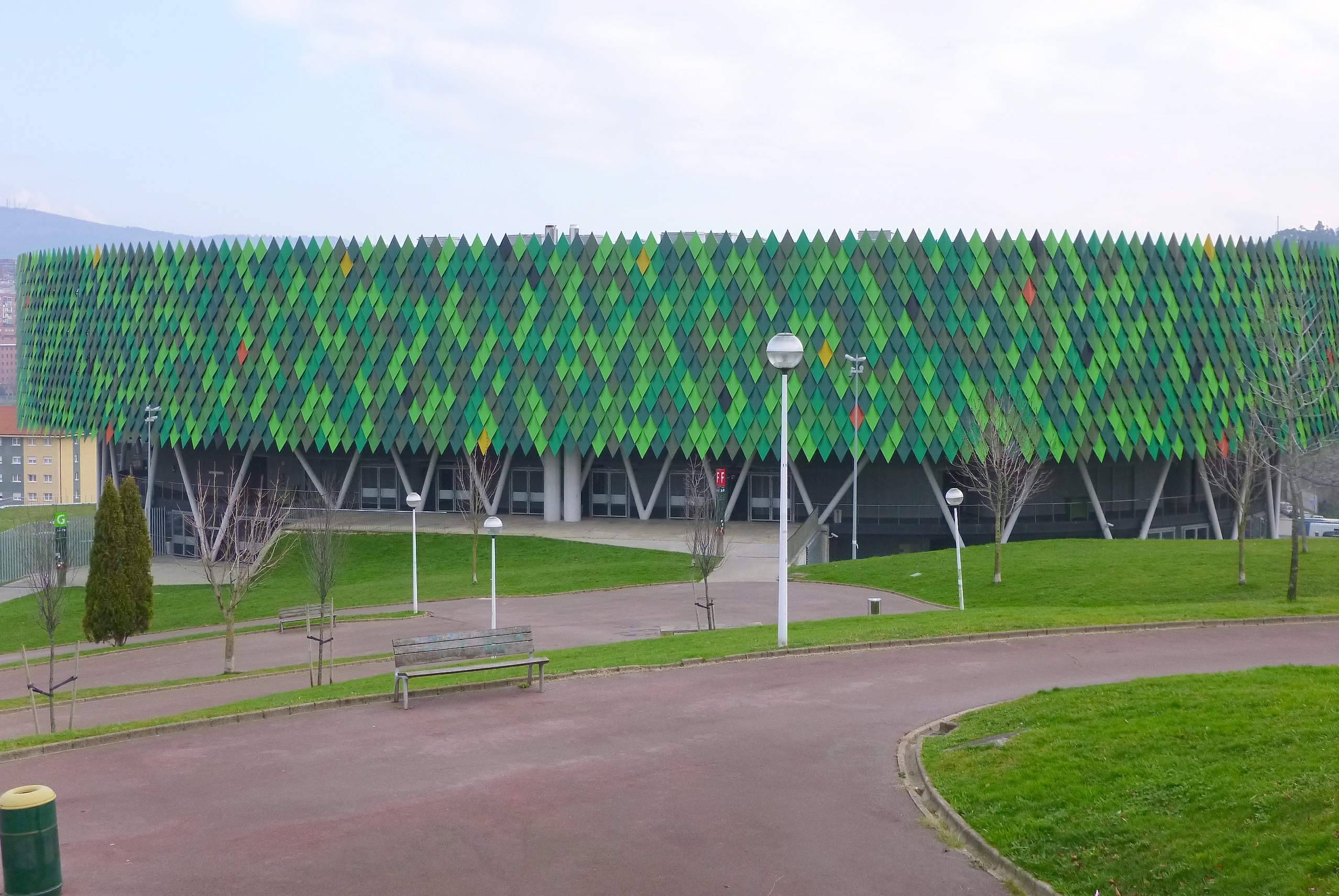 Pabellón de Deportes Bilbao Arena (Miribilla, Bilbao)